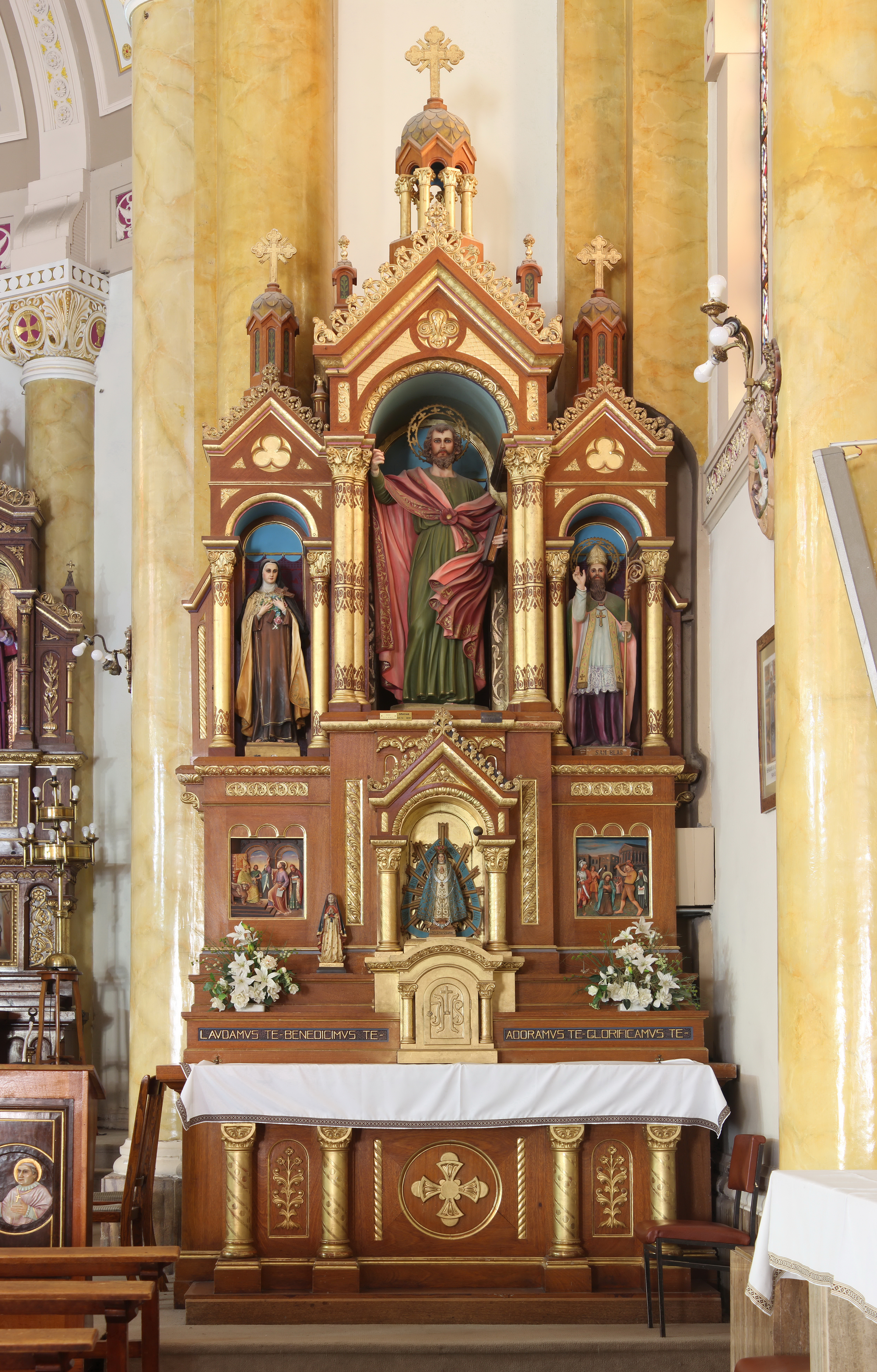 Altar menor de la Parroquia Inmaculado Corazón de María